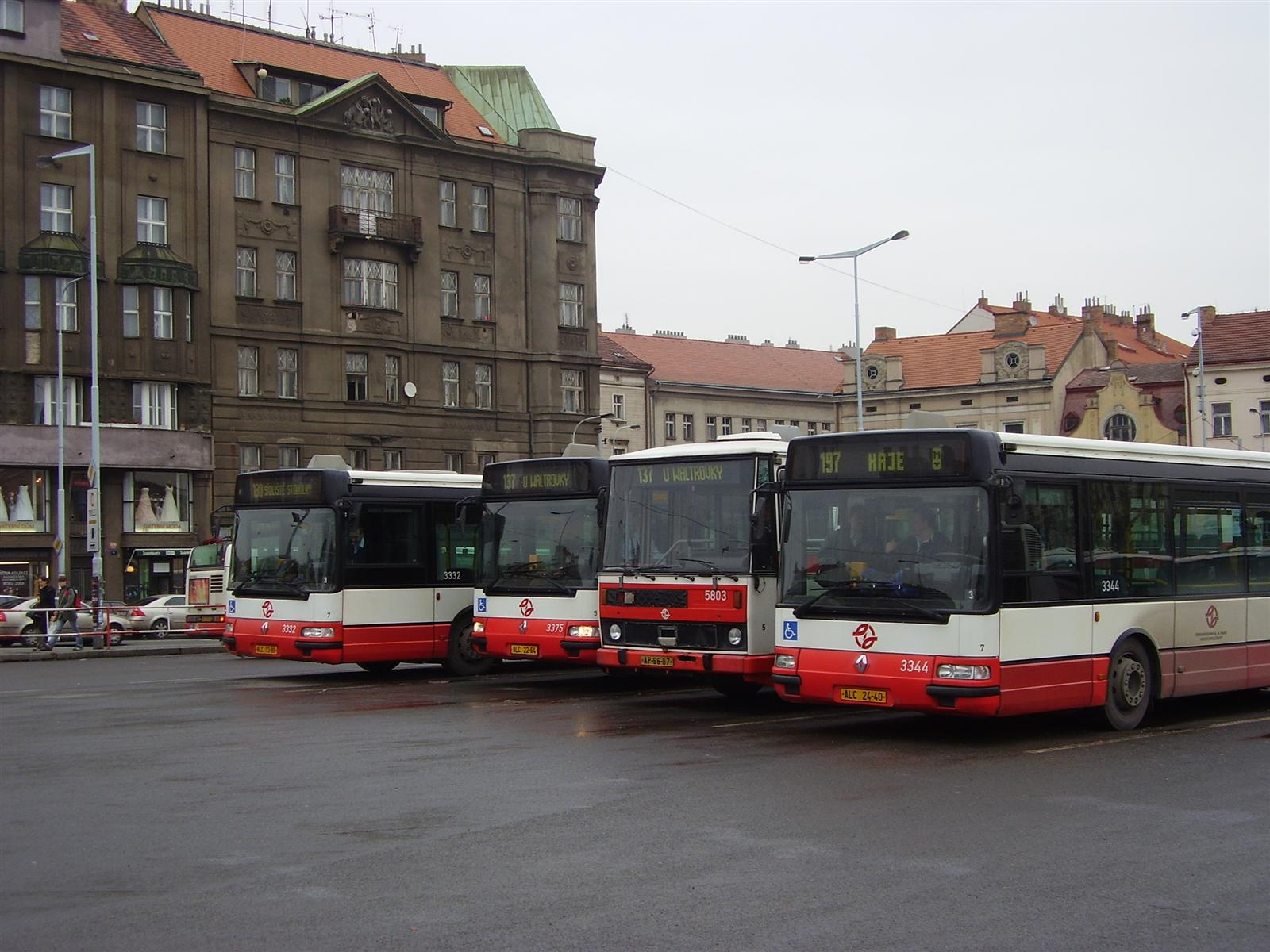 Městské autobusy na AN Na Knížecí v Praze